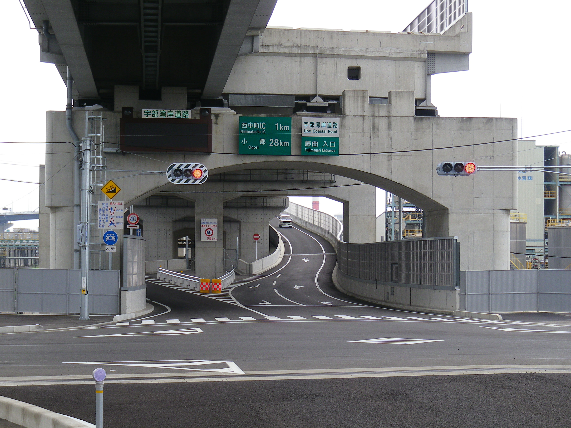 山口県宇部市。宇部湾岸道路藤曲インターチェンジ。2011年8月22日撮影。